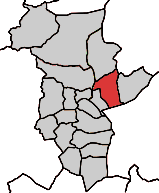 Situación da parroquia de Quende no concello de Abadín